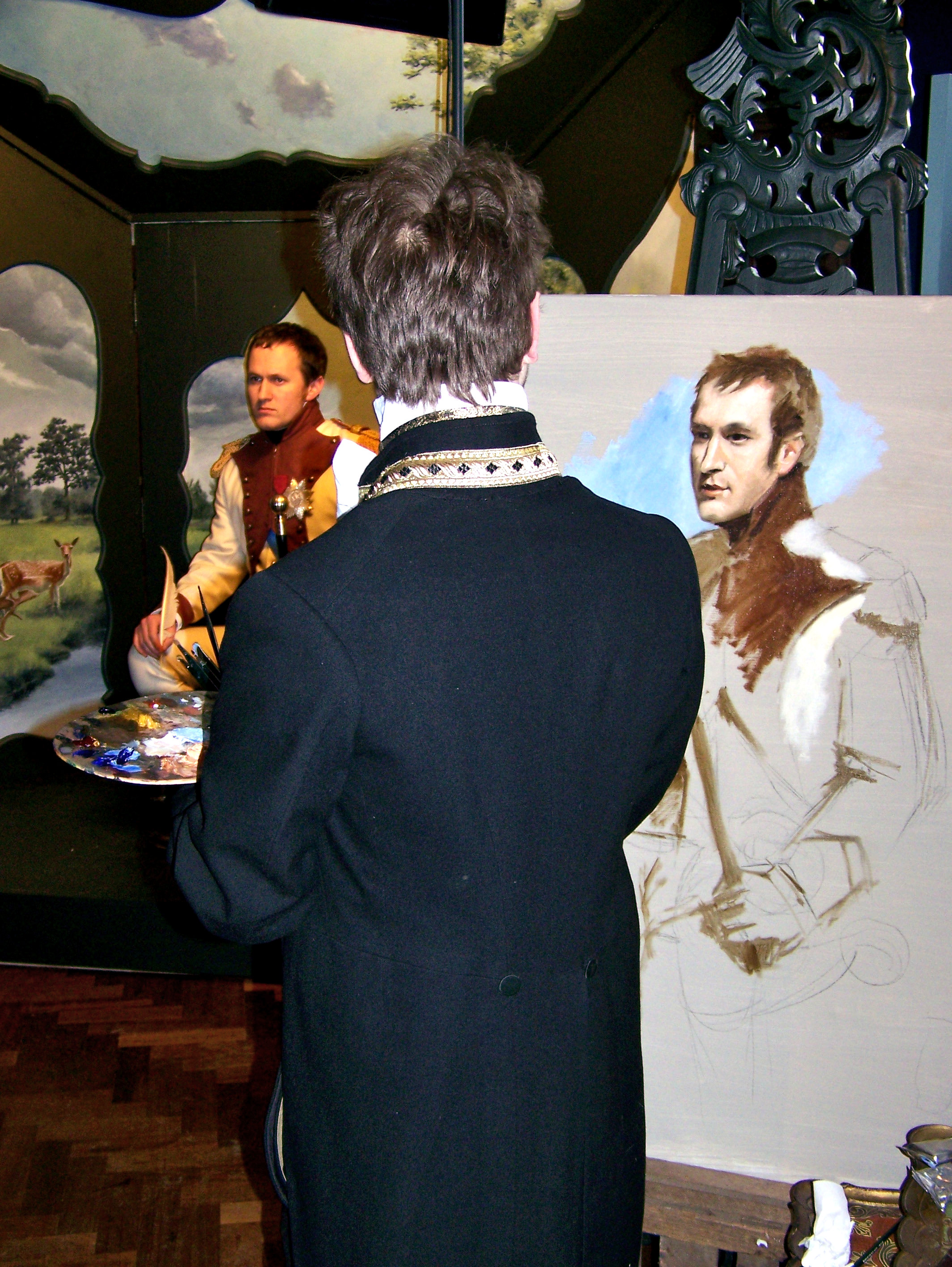 Daniel Douglas aan het werk in het Drents Museum